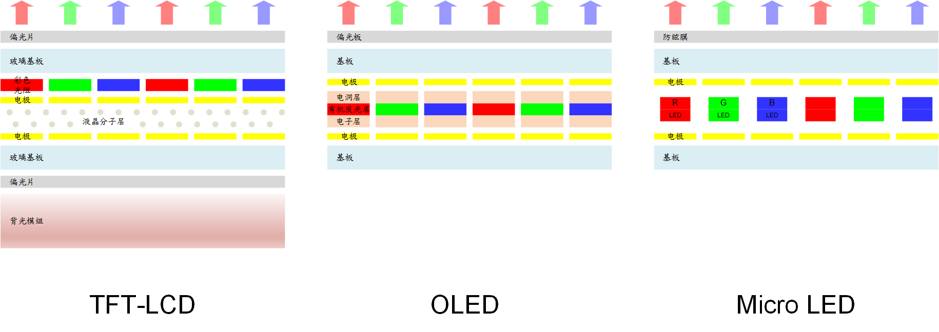 顯示原理比較修正版